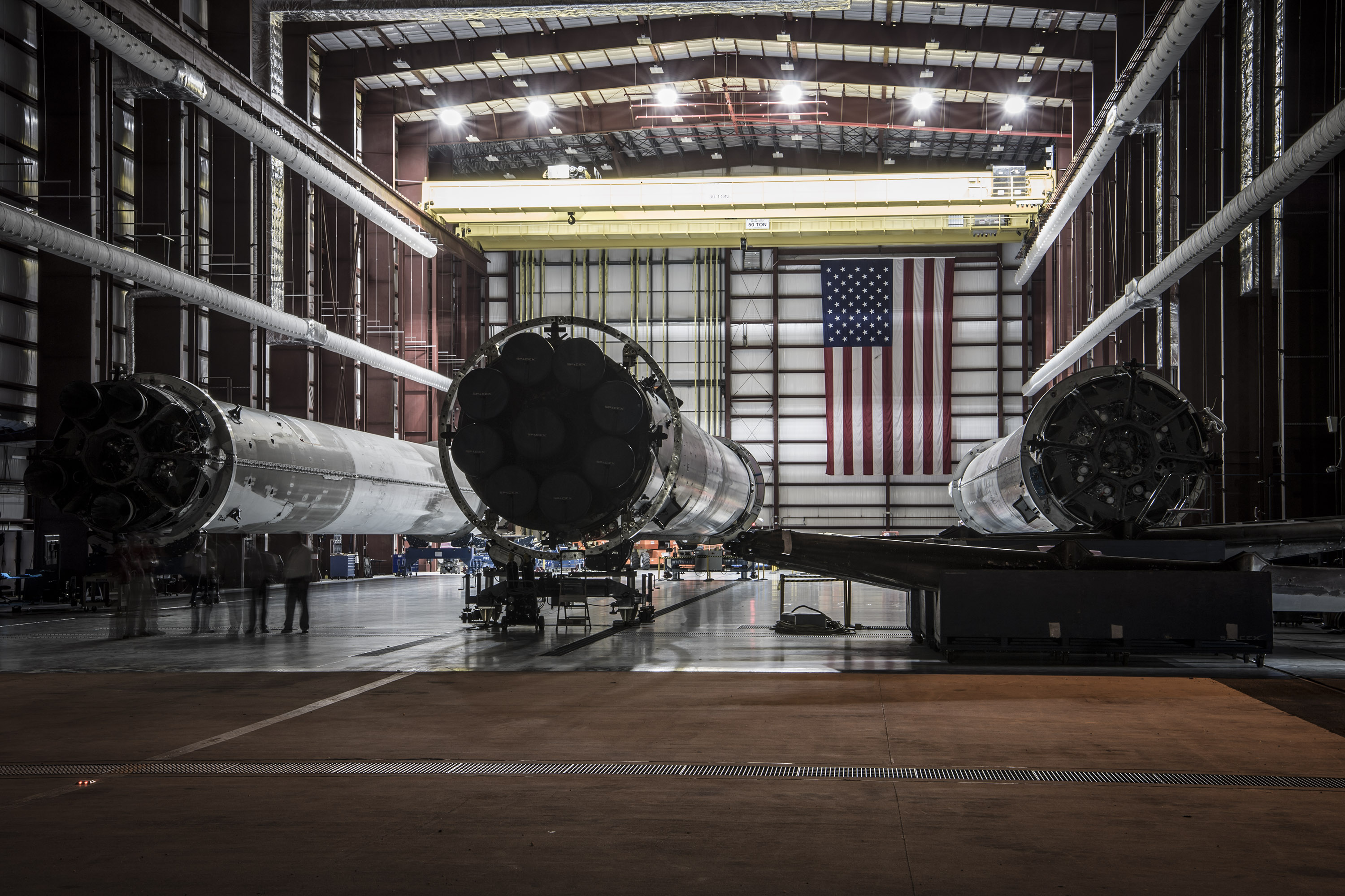 Landed rockets in hangar 39A